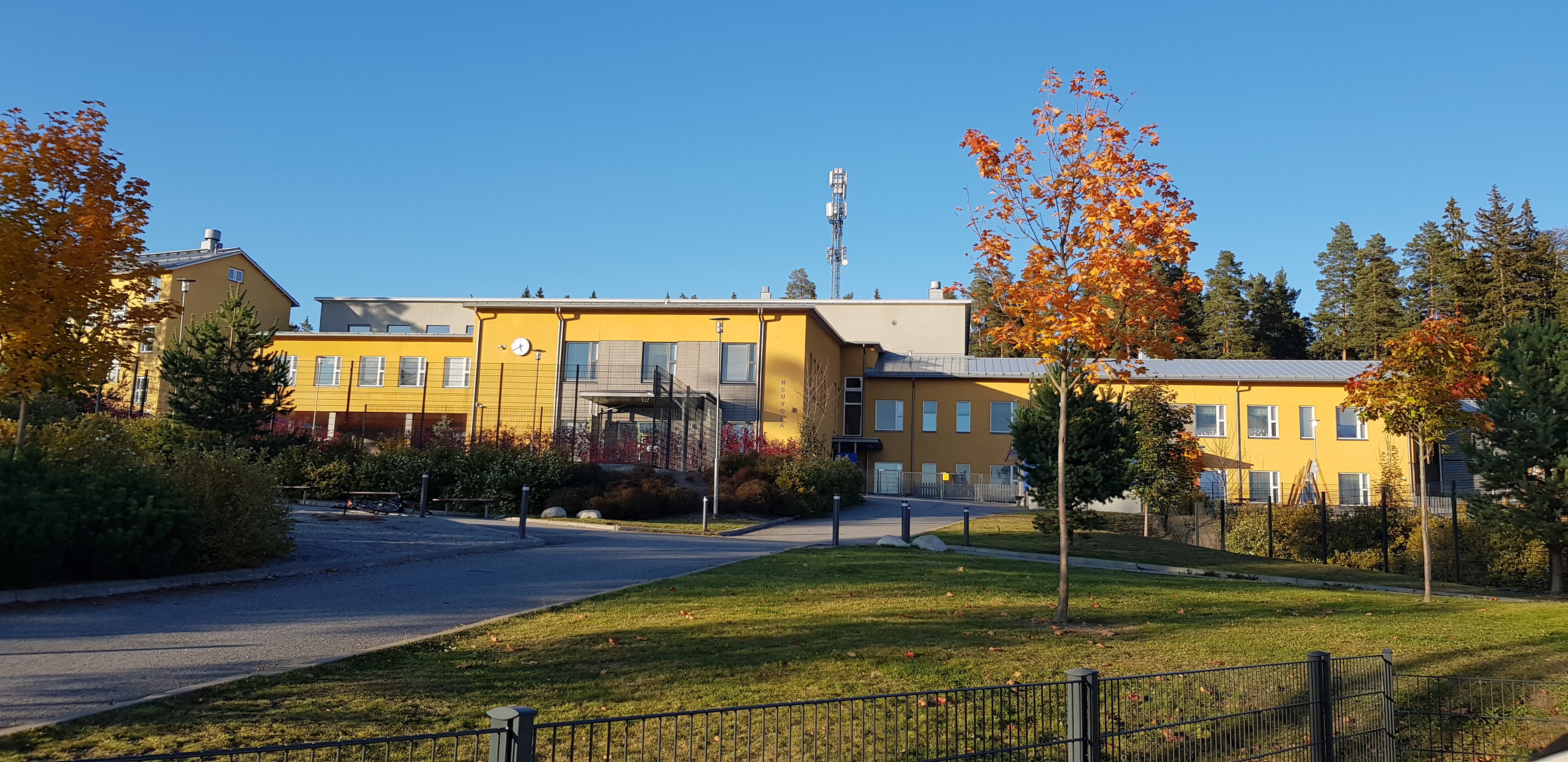 Siivikkalan koulu, neuvola ja koulukallion päiväkoti